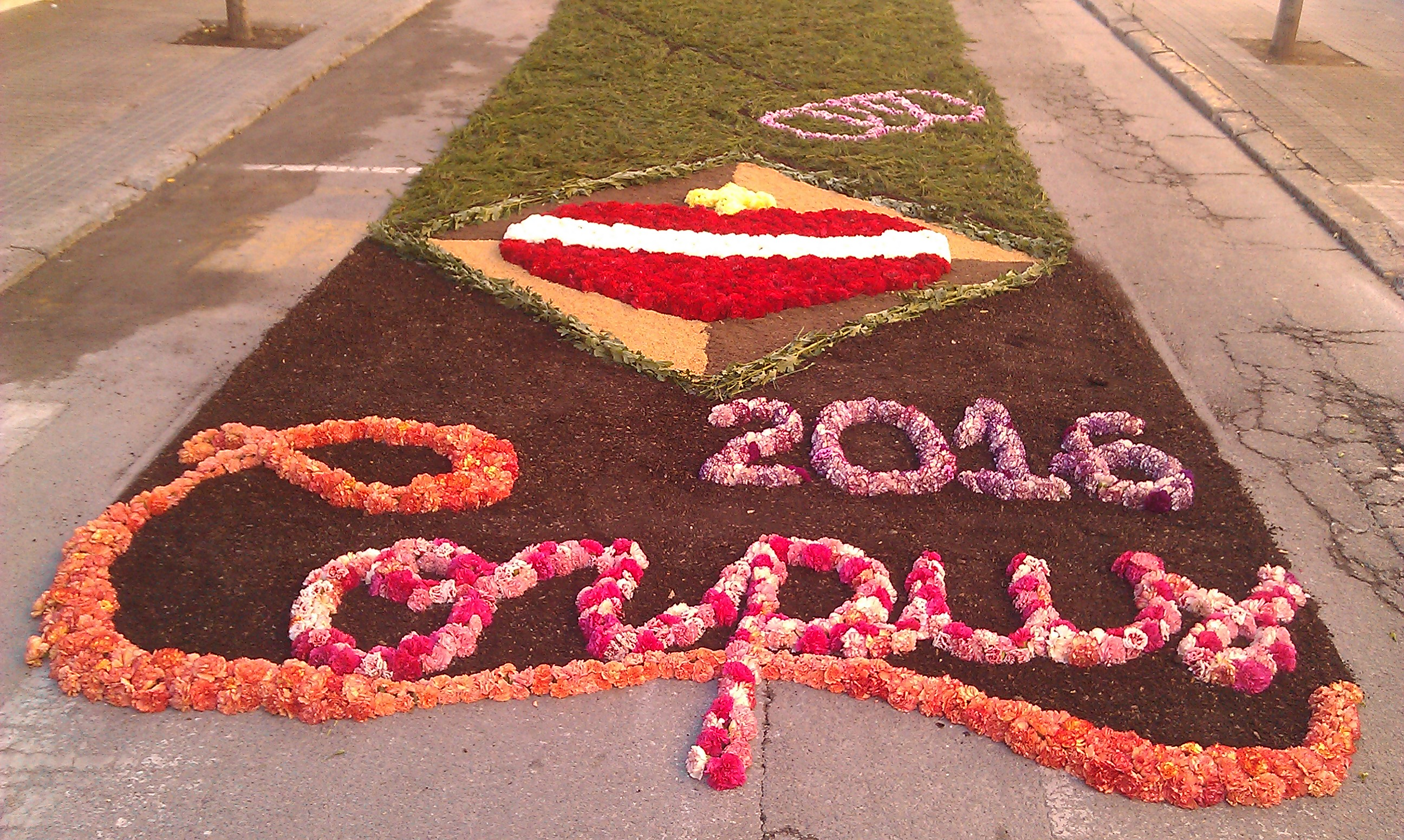 Alfombras de Corpus de la Garriga This is a photography of a Folklore festival in Spain (Wikidata id Q21479929).